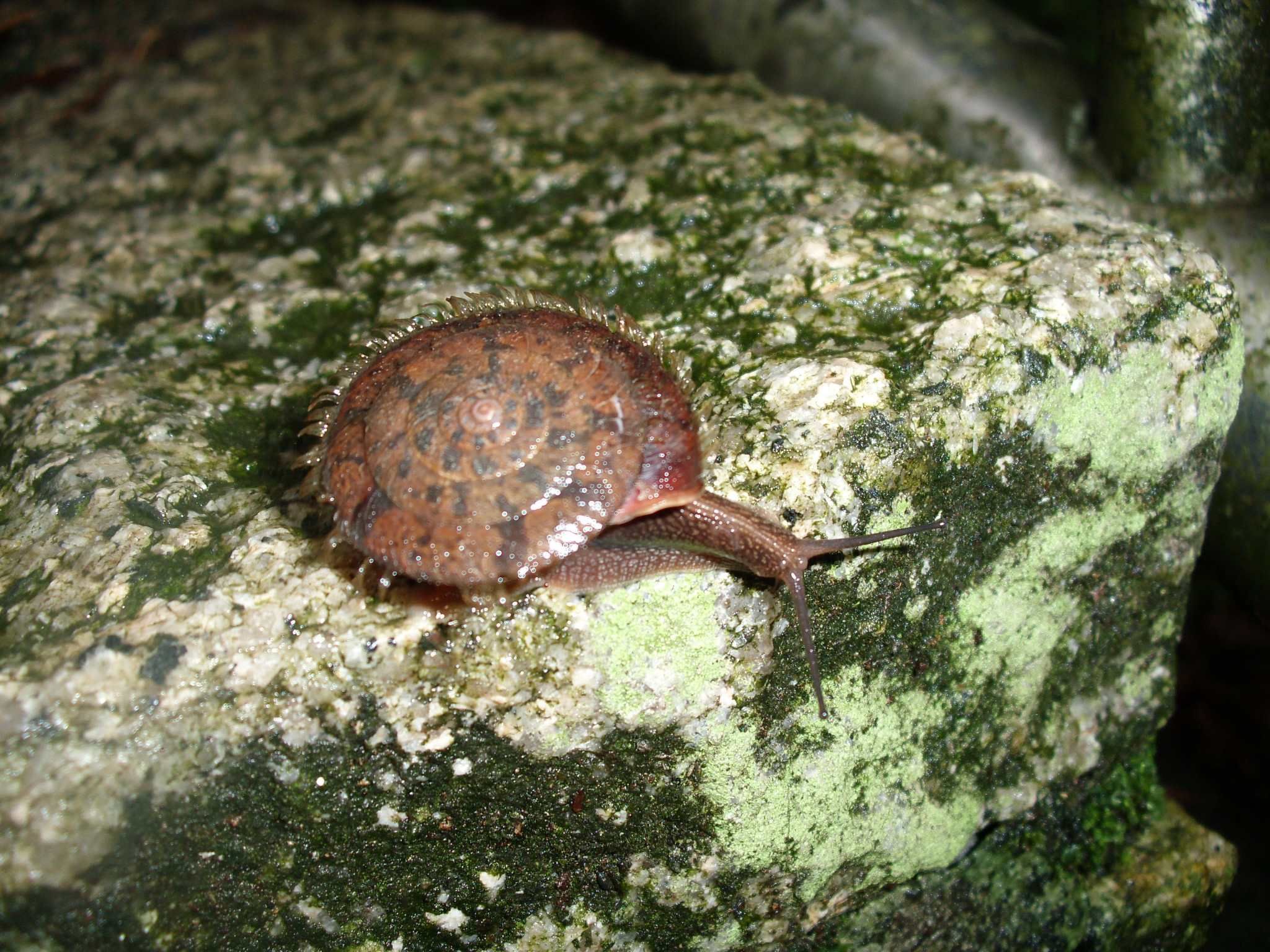 臺灣盾蝸牛，學名：Plectotropis mackensii (Adams & Reeve, 1850) (synonym: Aegista mackensii (Adams et Reeve, 1850)，拍攝地點在臺北仙跡巖。